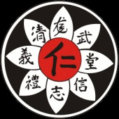 Rosace Thanh Long Vo Duong